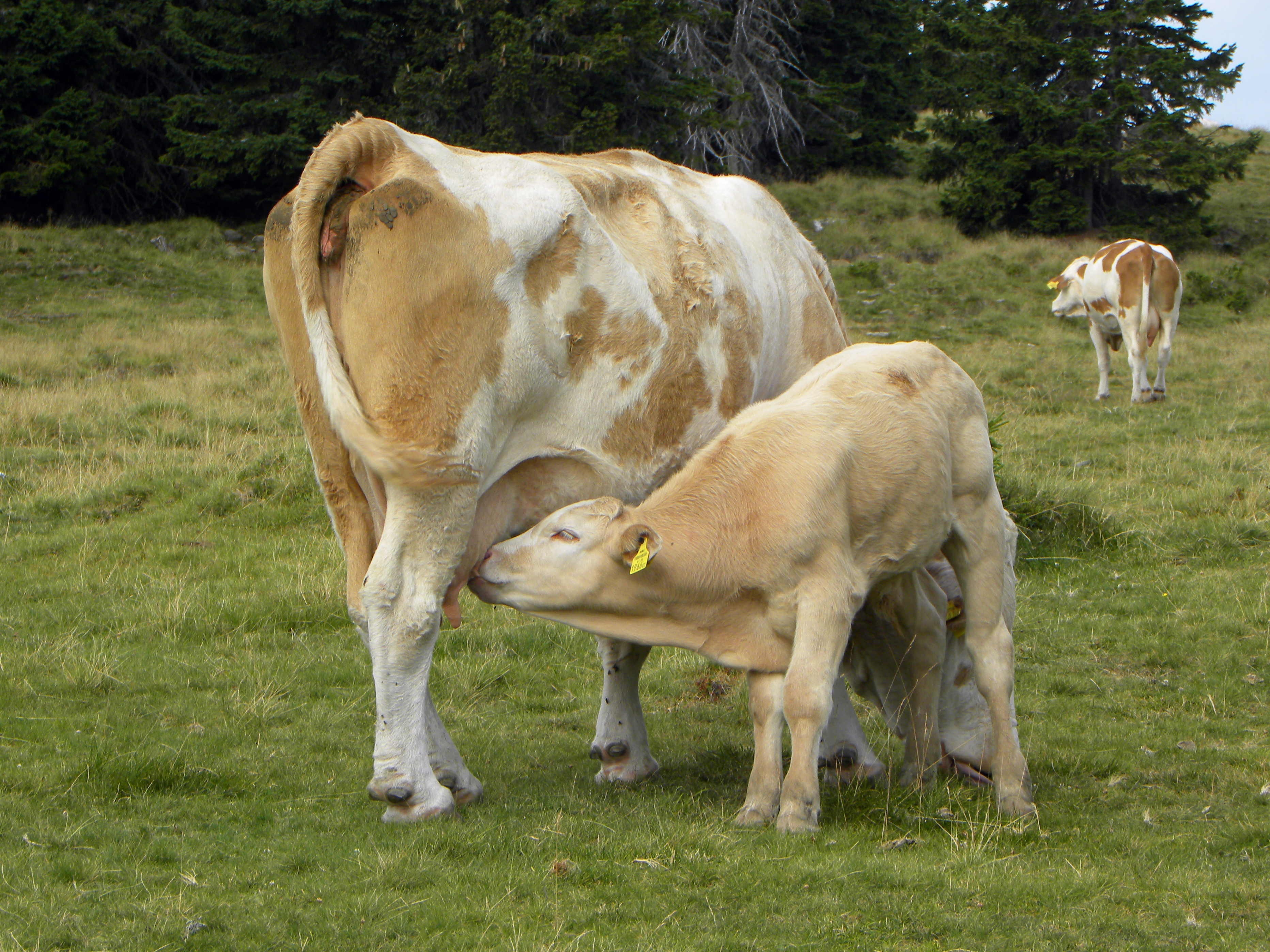 Wanderung von Mönichkirchen über den Hochwechsel nach Mariensee